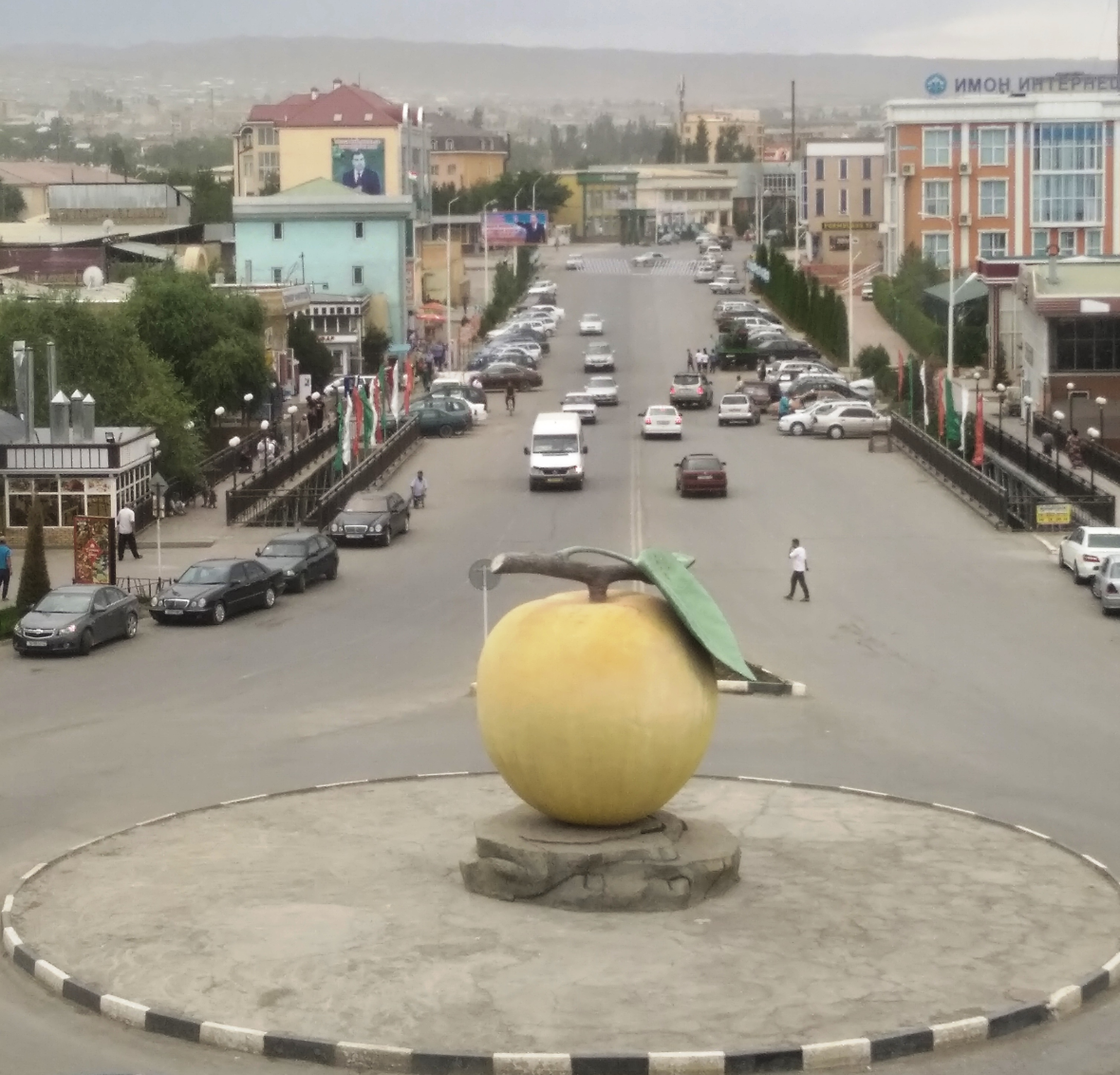 Тоҷикӣ: Муҷассамаи Зардолу дар ш. Исфара